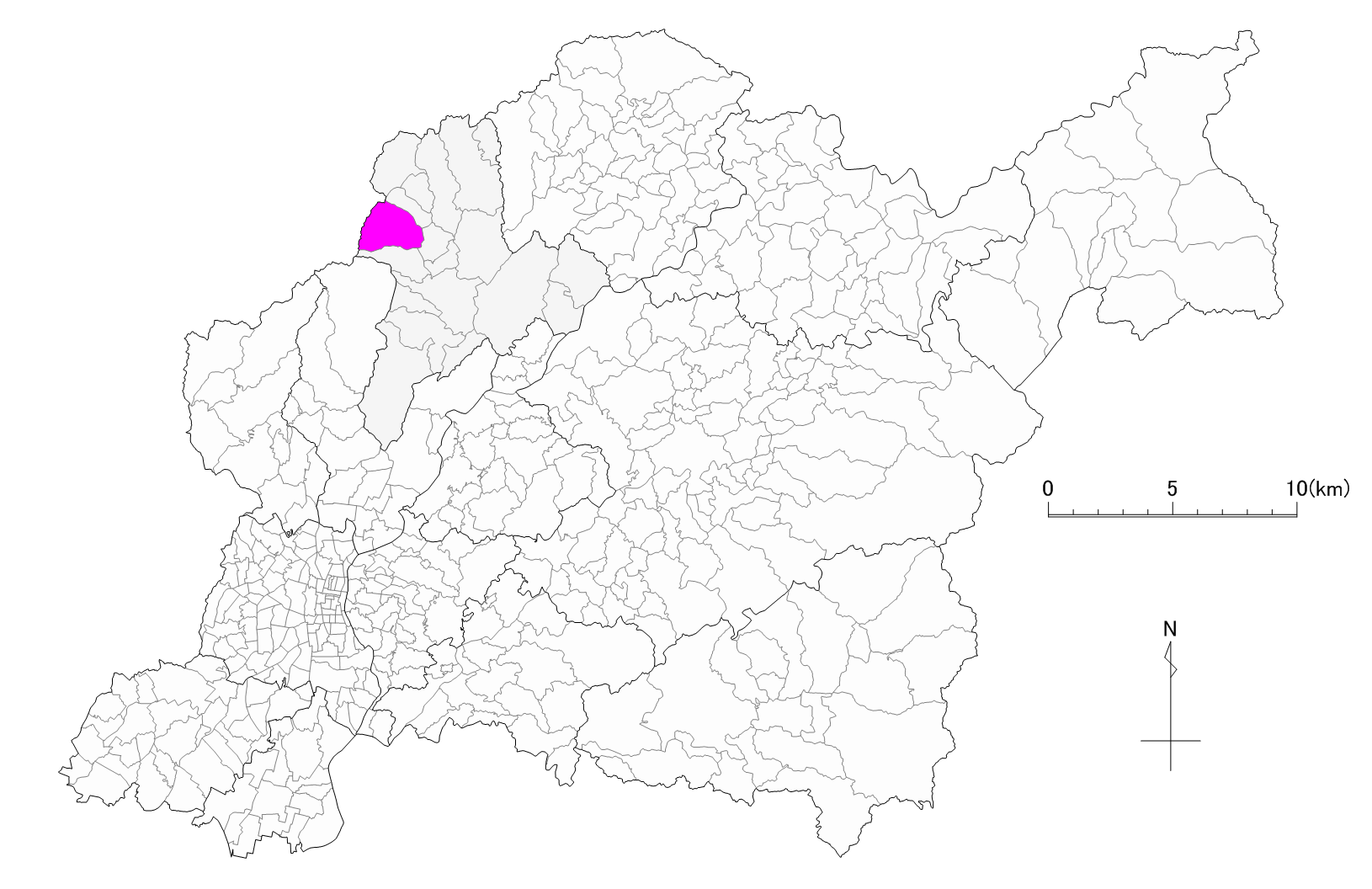 豊田市折平町位置図